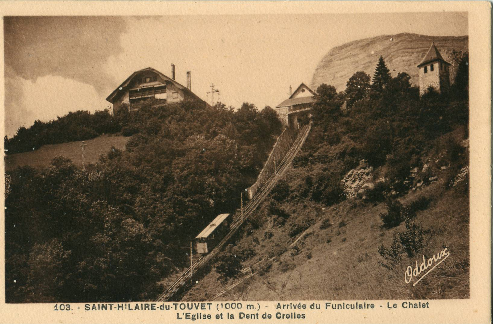 Carte postale ancienne éditée par Oddoux, n°103 : SAINT-HILAIRE-DU-TOUVET (1000 m.) - Arrivée du Funiculaire - Le Chalet, l'église et la Dent de Crolles